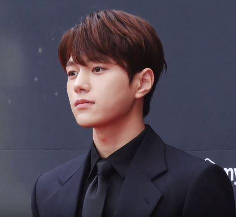 ‘2019 Asia Model Awards(2019 아시아모델어워즈)’ 레드카펫 행사가 9일 오후 서울 송파구 올림픽공원 올림픽홀에서 열렸다.